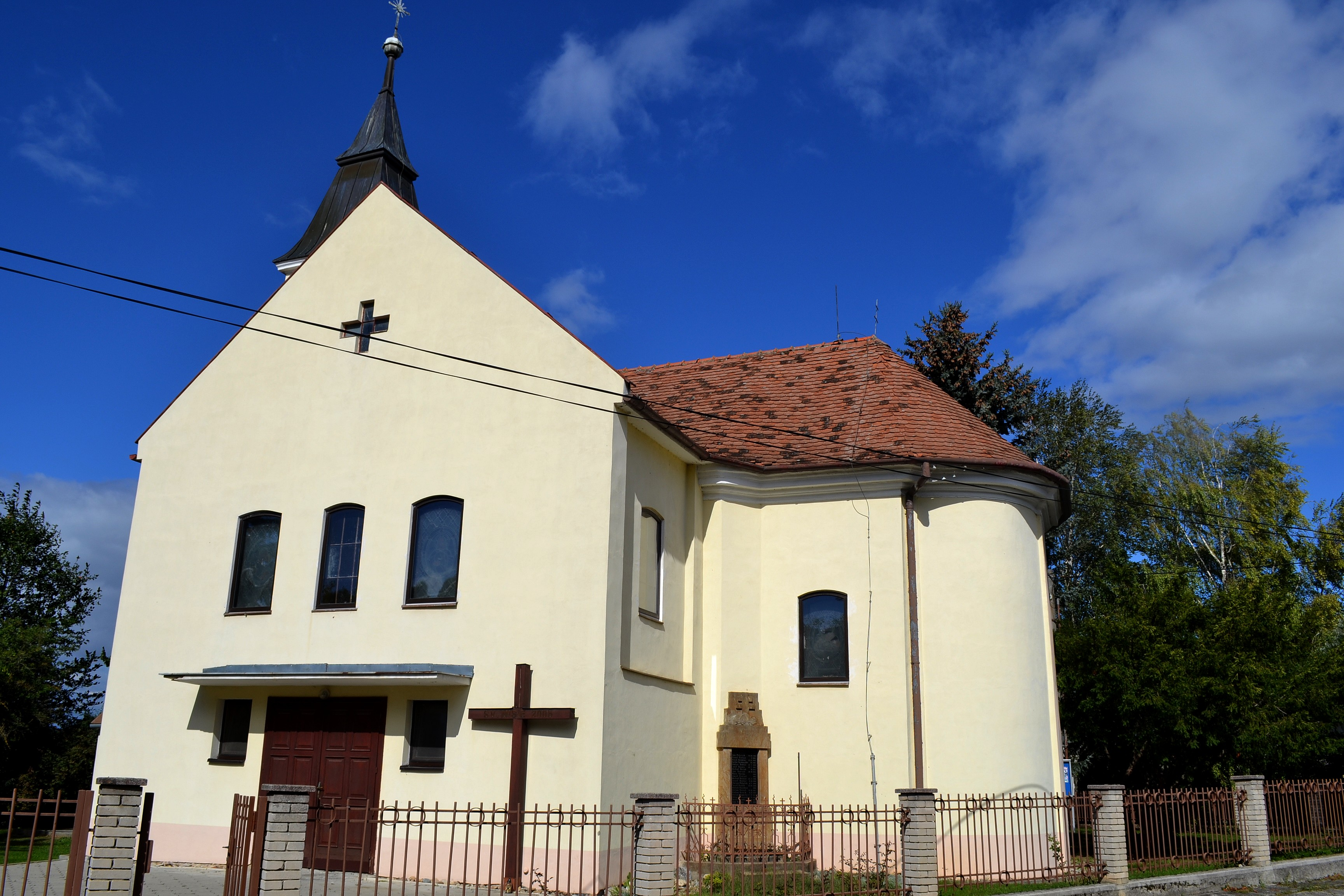 Merašice (okr. Hlohovec), Kostol svätého Martina; priečelie s hlavným vchodom